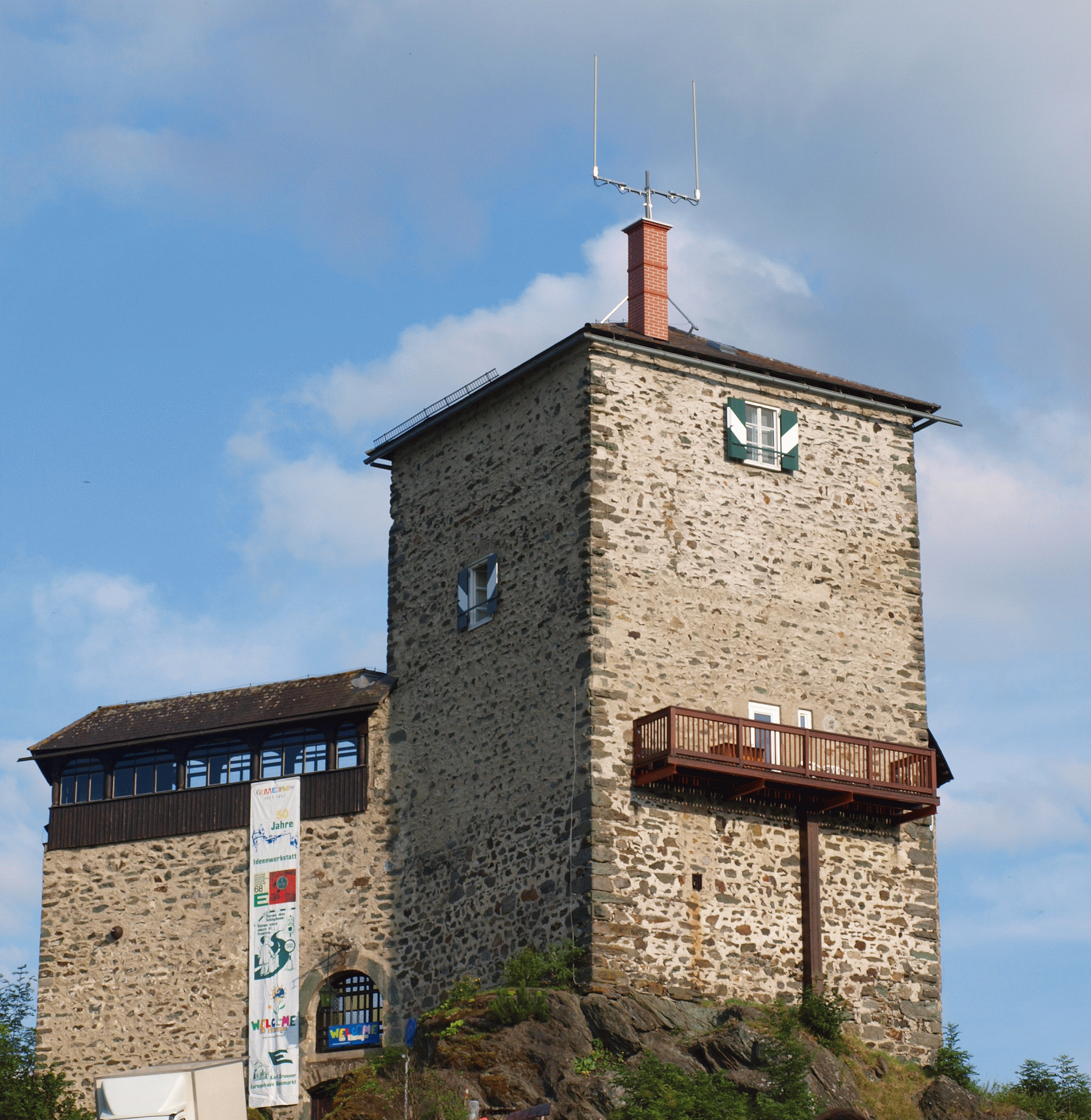 Wehrturm von Schloss Forchtenstein in Neumarkt (Steiermark) mit Verbindungsgebäude.